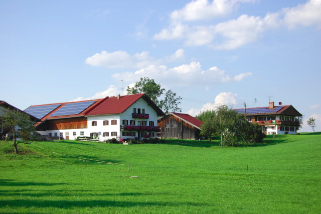 Nodern: Bauernhof